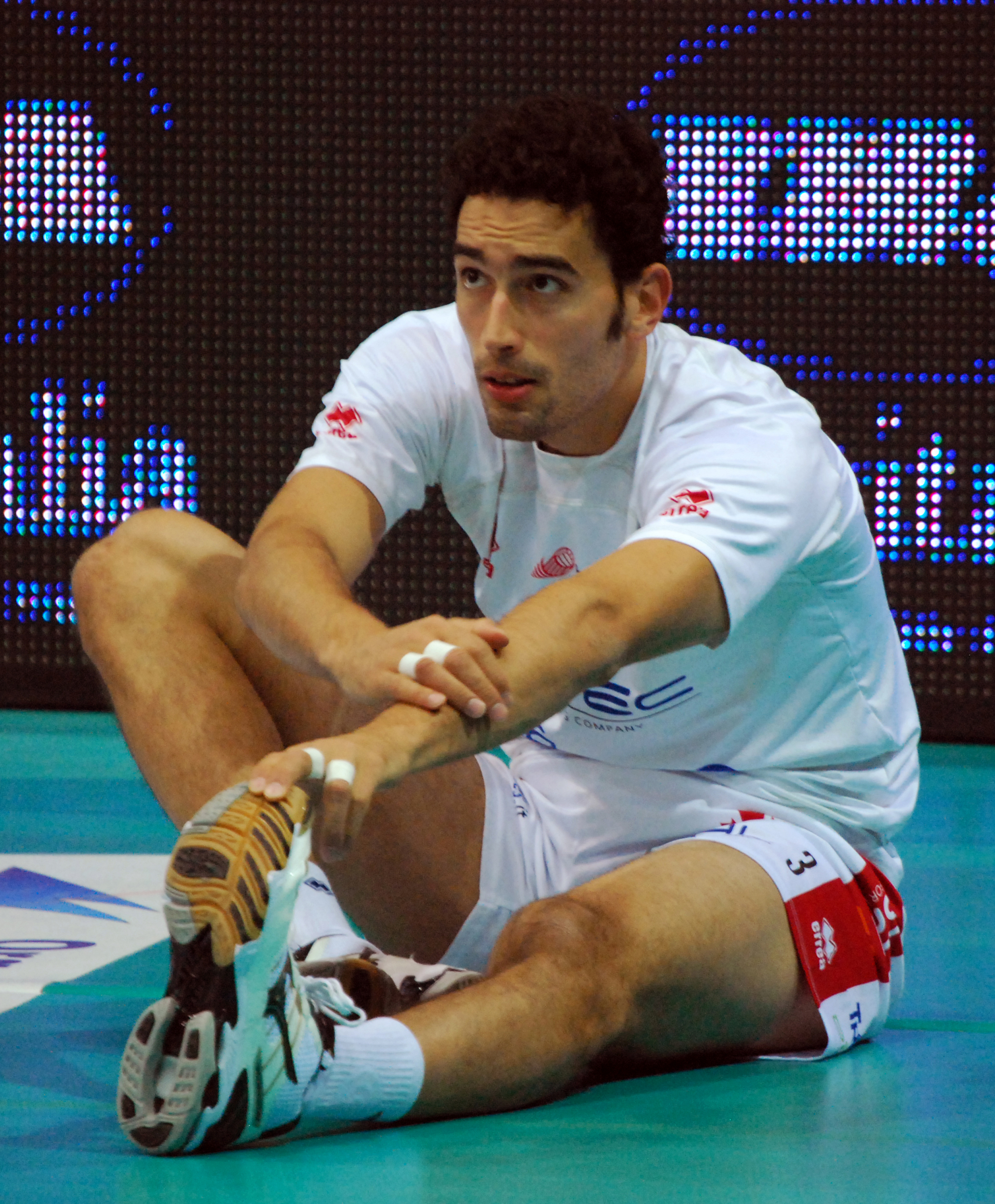 Emanuele Birarelli, Foto che ho scattato al Palabanca di Piacenza in occasione della partita Copra-Trento